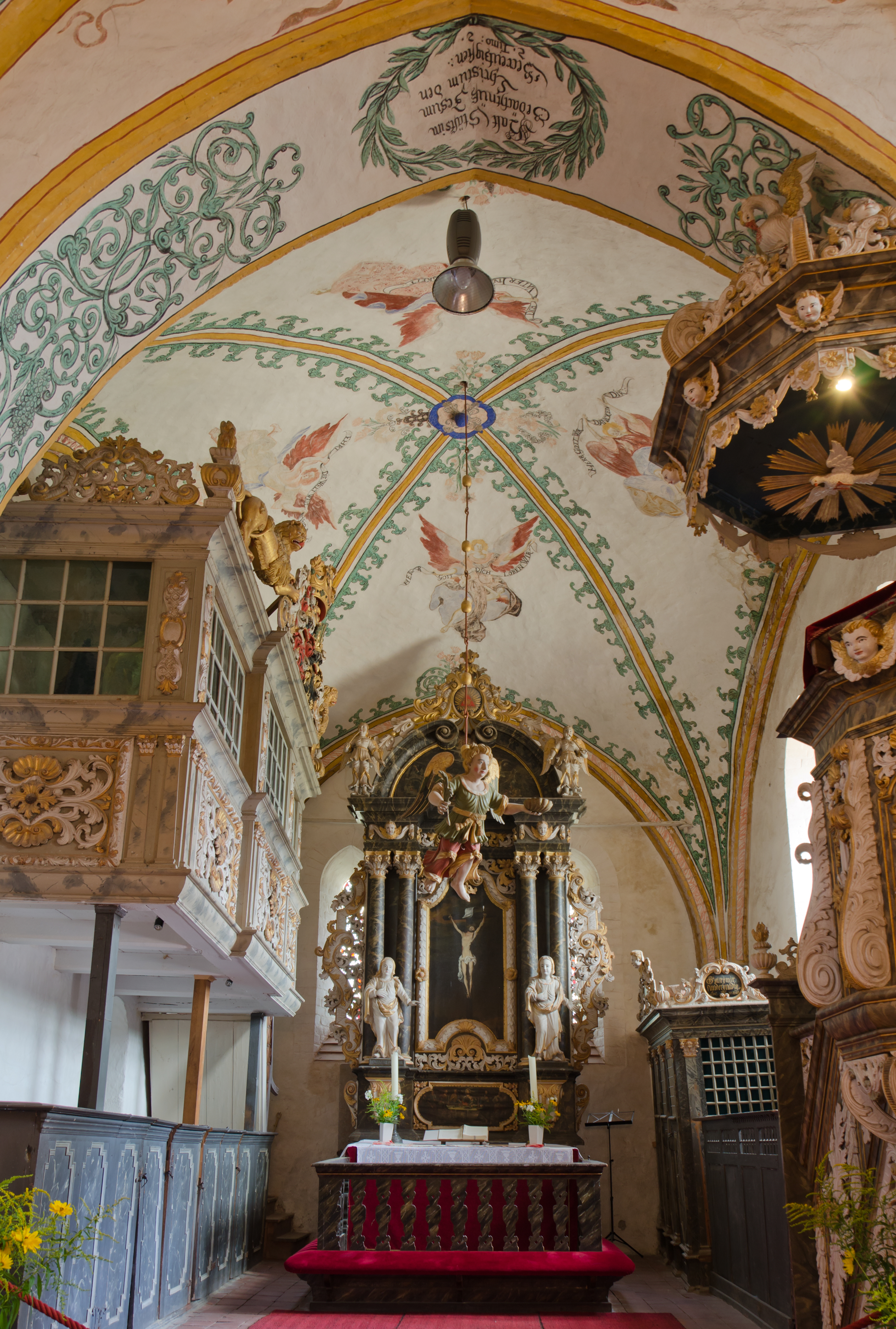 Rerik Kirche Blick zum Altar